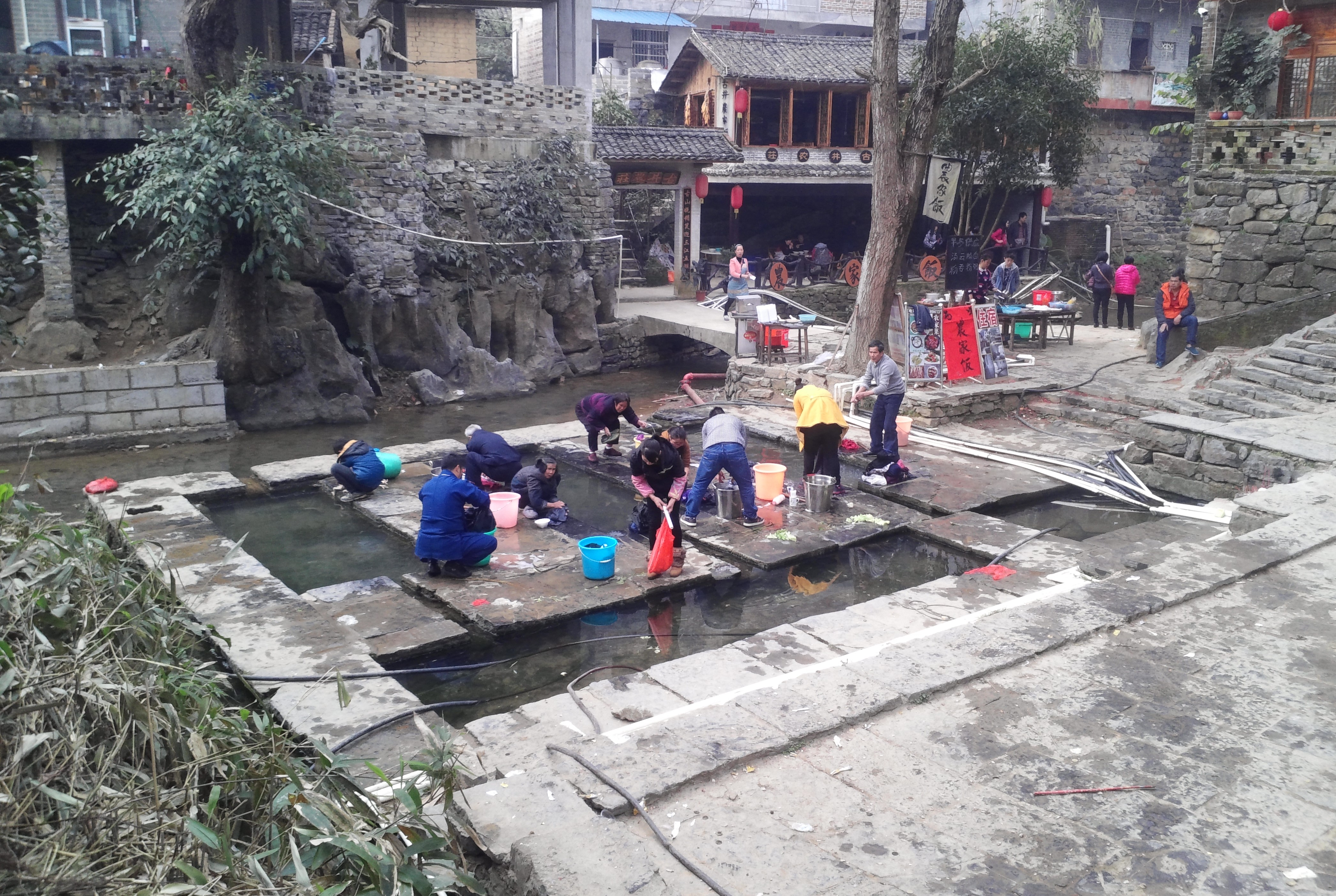 黃姚鎮內的仙人古井